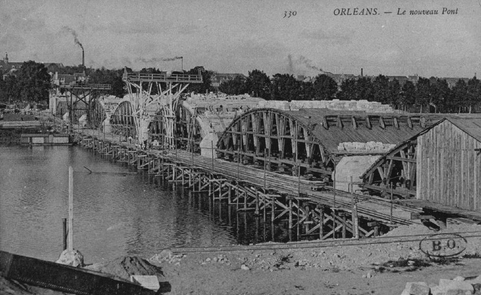 L’ancien pont du Maréchal Joffre en construction(construit en 1905, détruit en 1940) sur la Loire, Orléans, Loiret, France